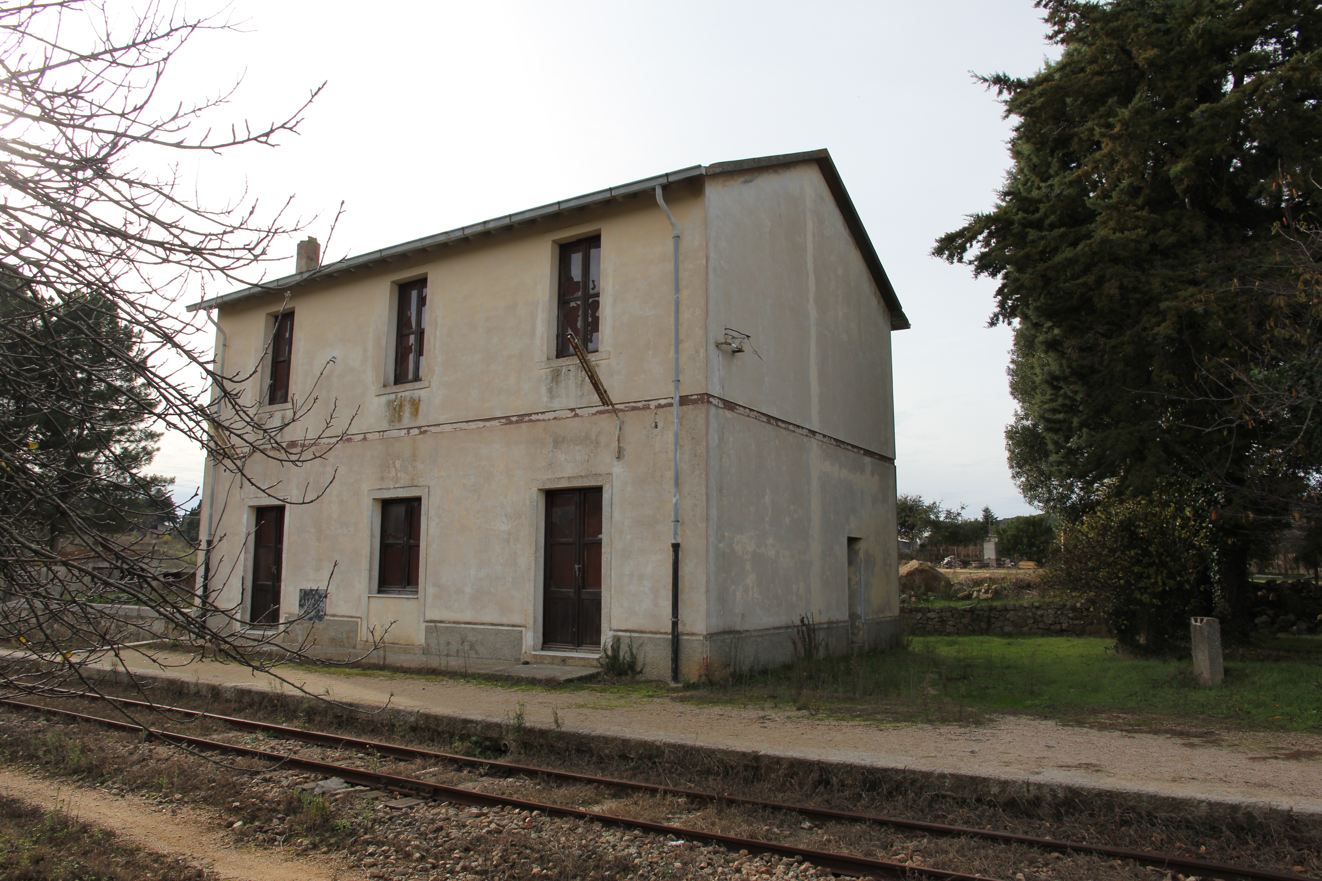 Stazione ferroviaria di Nuchis